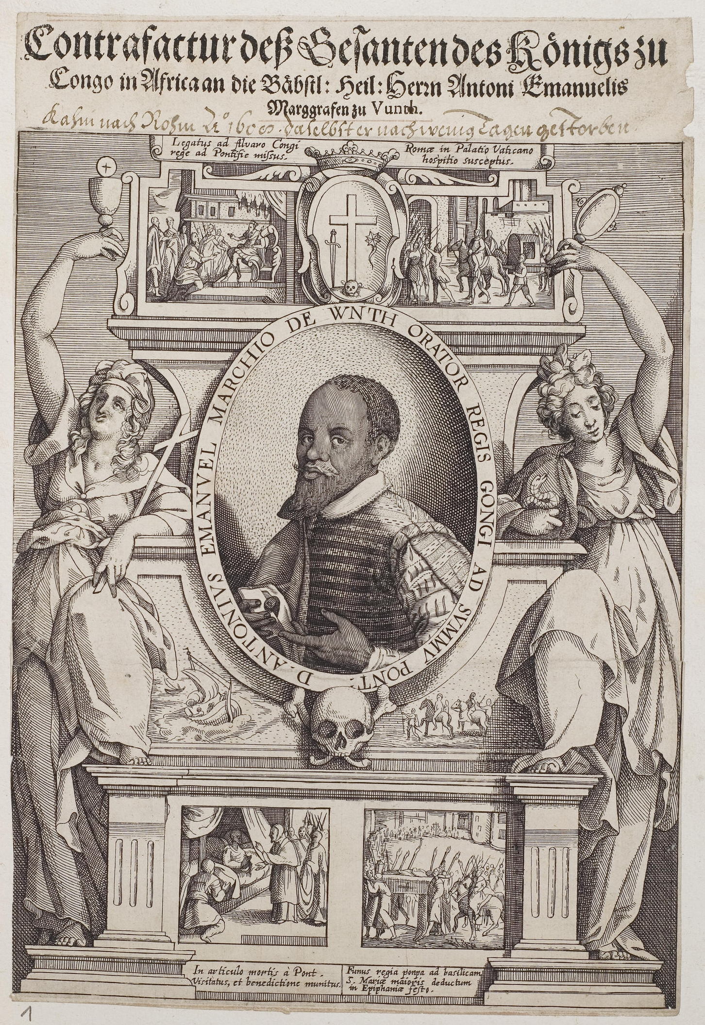 Grafik aus dem Klebeband Nr. 2 der Fürstlich Waldeckschen Hofbibliothek Arolsen Motiv: Anton Emanuel, Markgraf von Vunth († 1608 in Rom), Botschafter des kongolesischen Königs (Mani-Kongo) Alvaro II. (1587–1614), am heiligen Stuhl "Contrafactur des Gesandten des Königs zu Congo in Africa an die Bäpstl. Heil. Herrn. Antoni Emanuelis Marggrafen zu Vunth", "Legatus ad Alvaro Congi rege ad Pontifice missus. Romae in Palatio Vaticano hospitio susceptus", "D. Antonius Emmanuel Marchio de Wnth Orator Regis Gongi ad Summu[m] Pont:" handschriftlich: "kahm nach Rohm Ao. 1608, dasselbst er nach wenig Tagen gestorben"